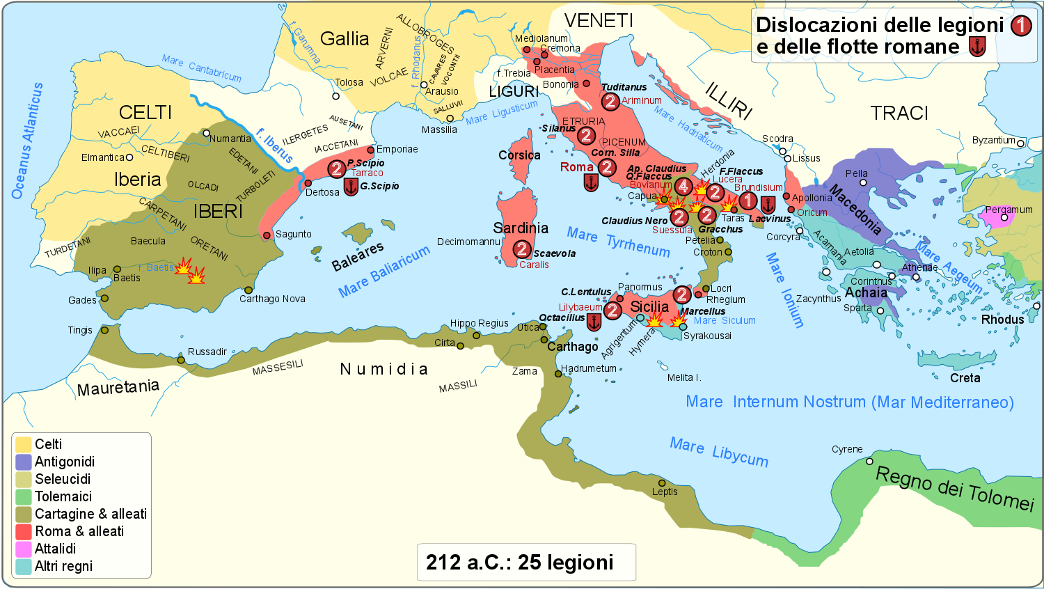 Dislocazione e dimensione delle armate romane nel 212 a.C. durante la seconda guerra punica